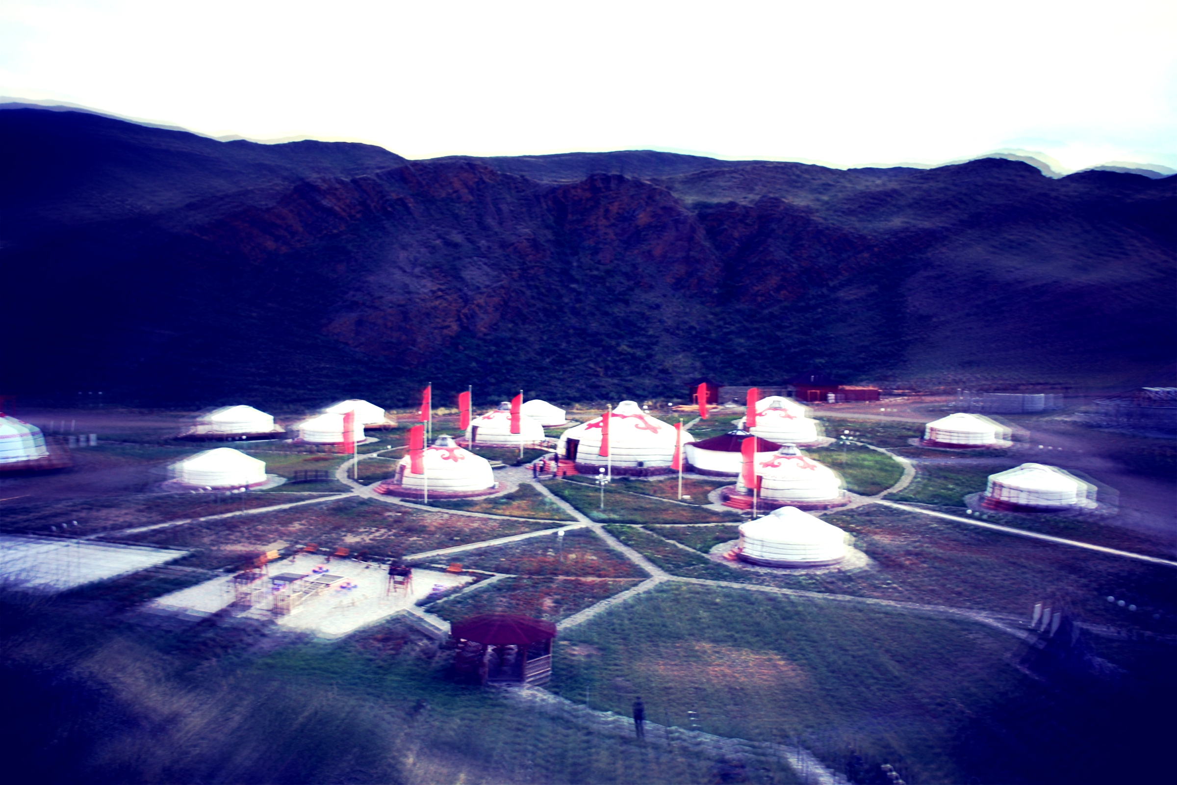 Этнокультурный комплекс "Алдын Булак"